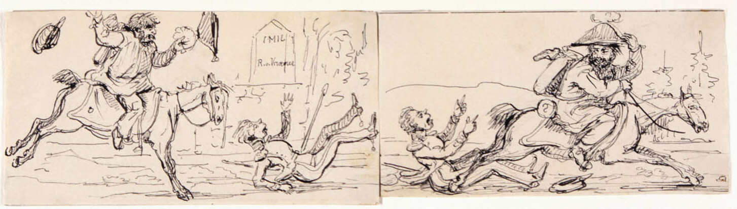 Sparfs äventyr. Vandraren stjäl Sparfs häst och officersmössa. Tusch av Fritz von Dardel, 1840